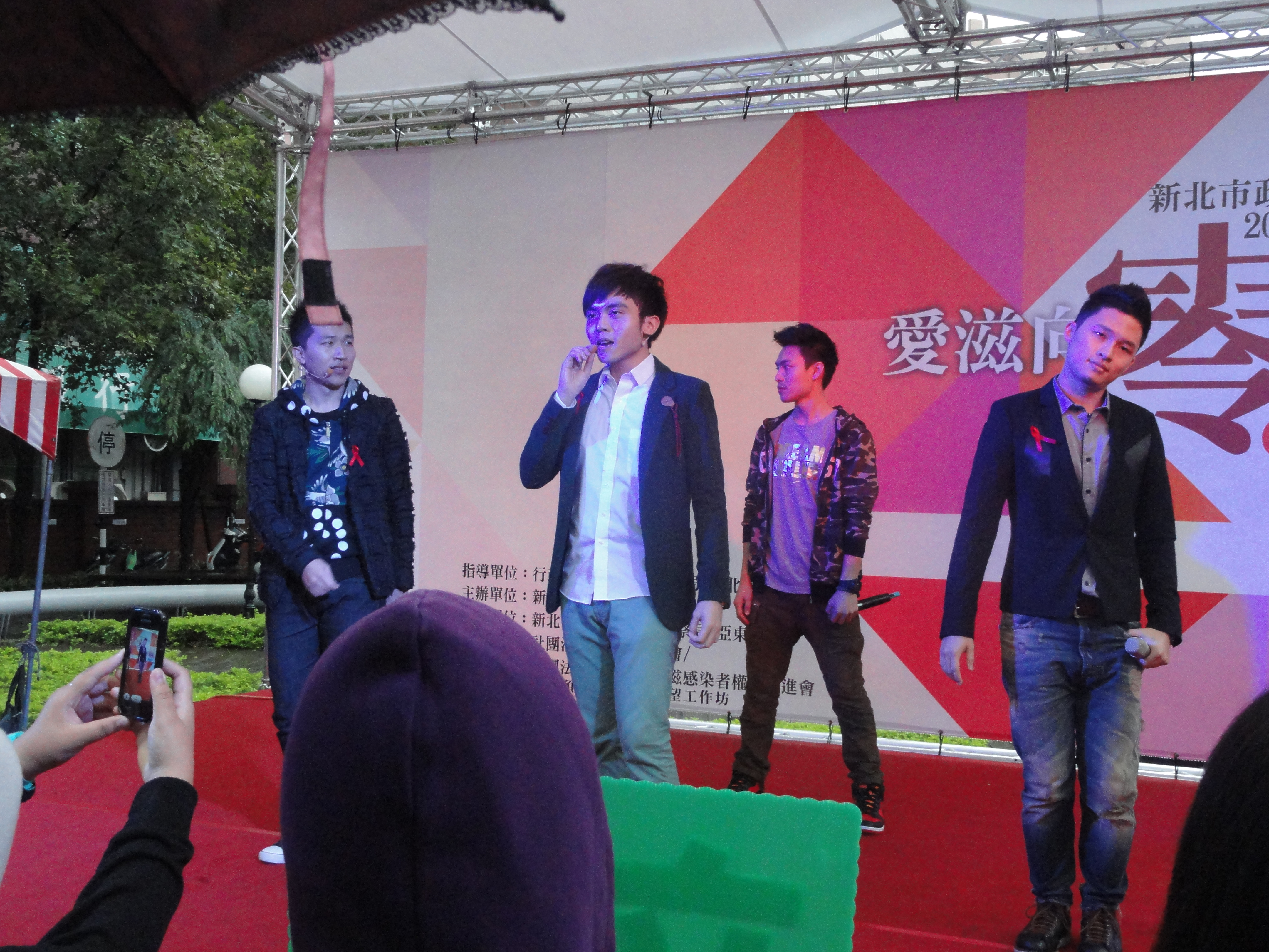 2012年12月1日「愛滋向零、未來就贏」宣導活動 新北市政府主辦 （楊昇達為右一）